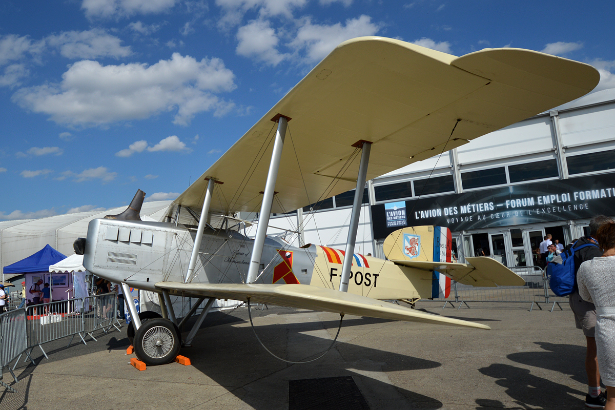 Private, F-POST, Breguet XIV